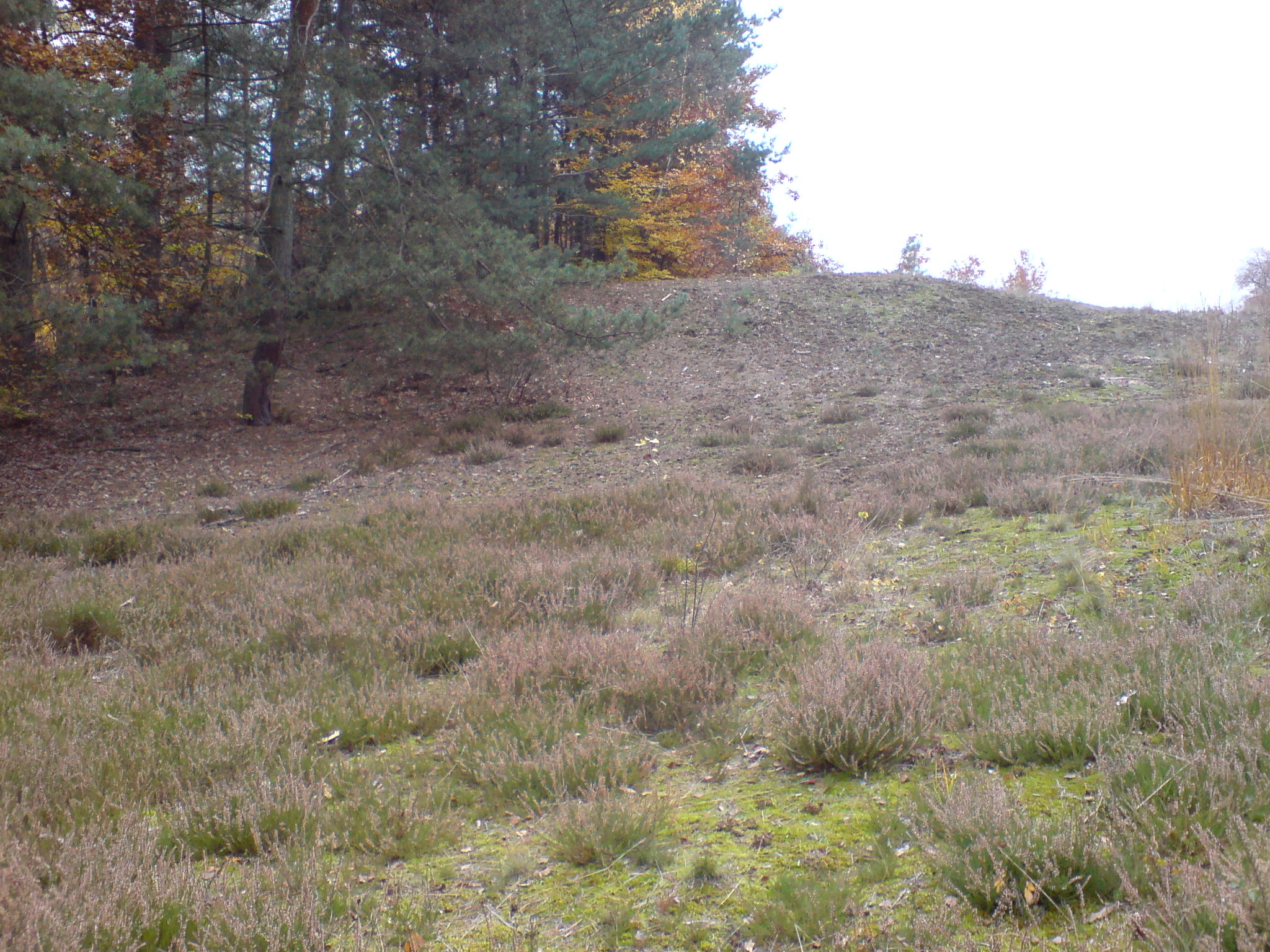 Binnendüne in Homburg